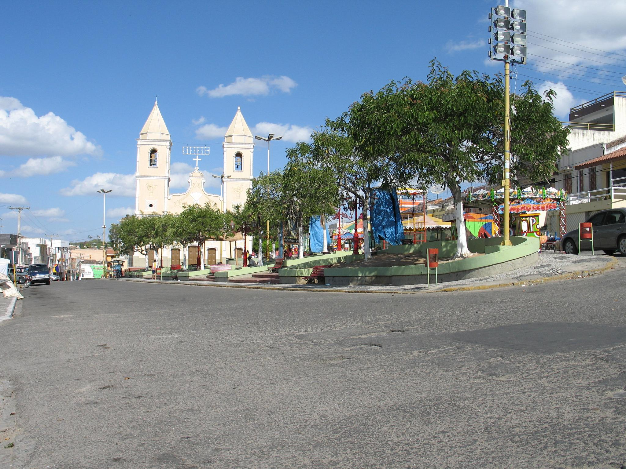 Praça da Matriz - Bezerros